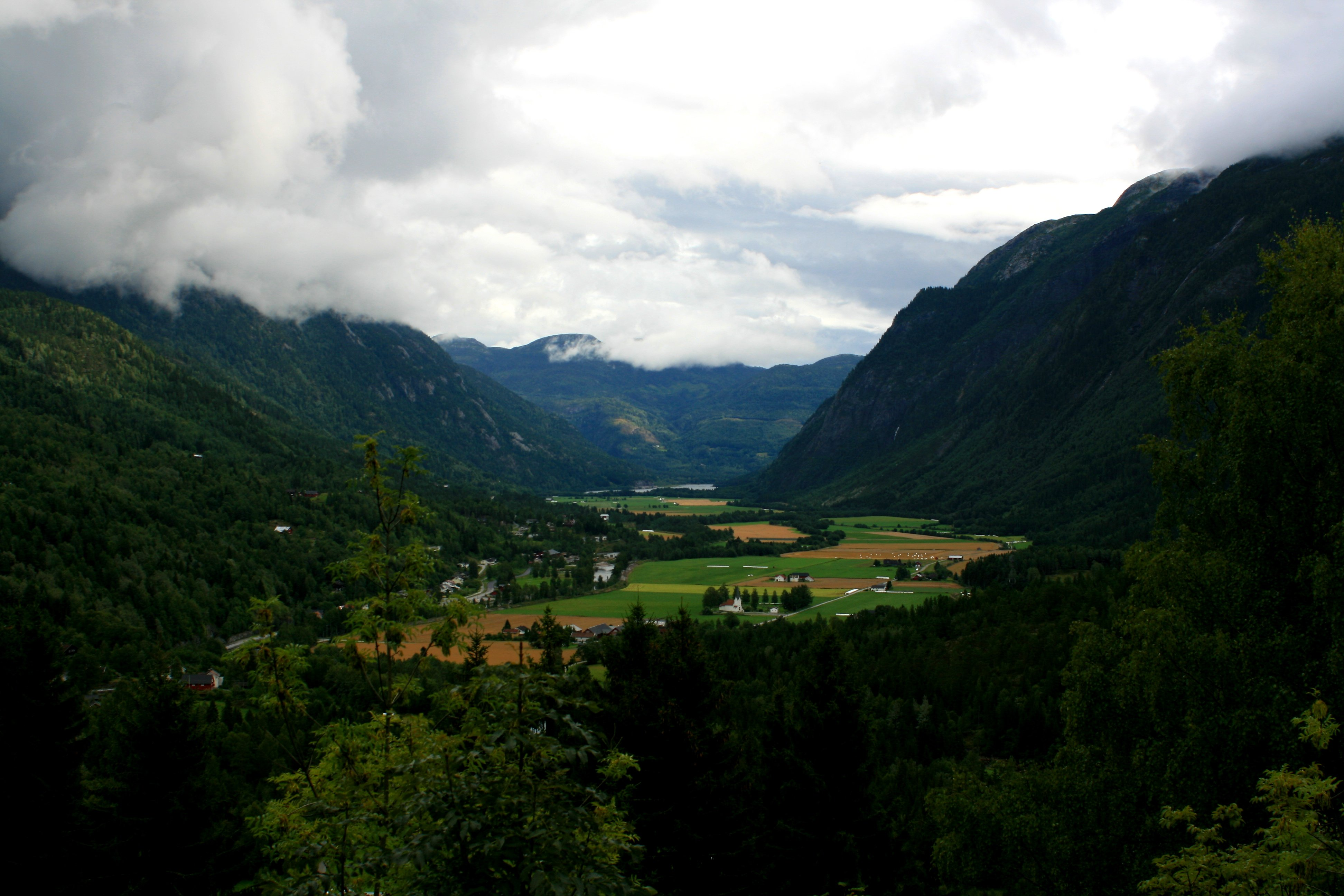 Flatdal i Telemark